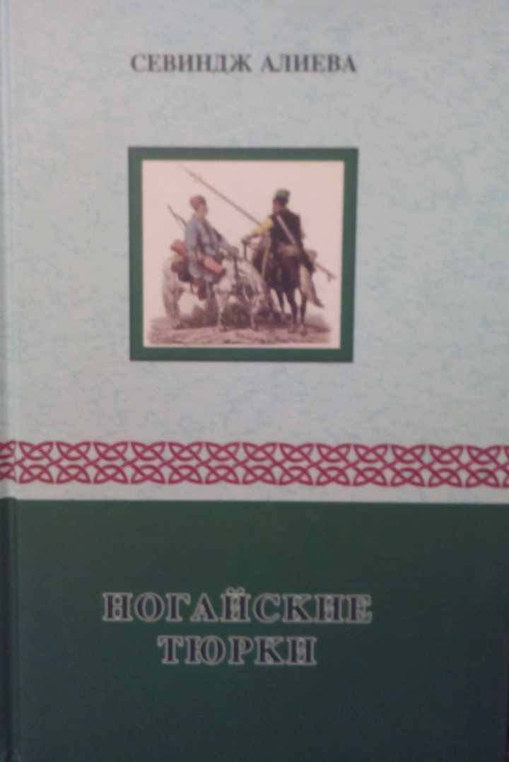 Noqaylar